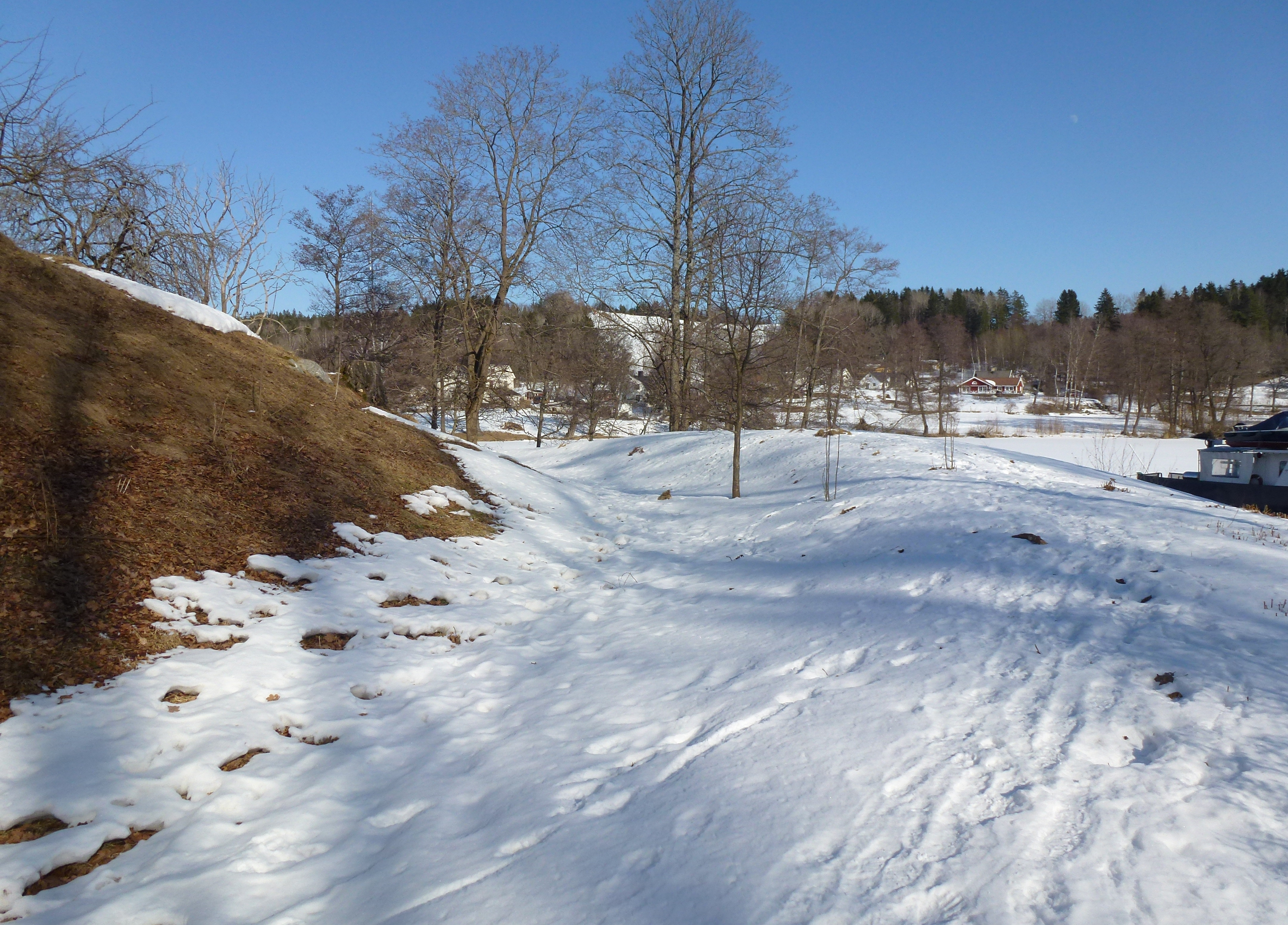 Vallgrav och vall (med tidigare palissad?)